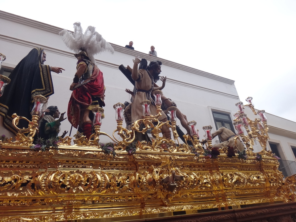 Semana Santa 2014, Jerez (Andalucía)